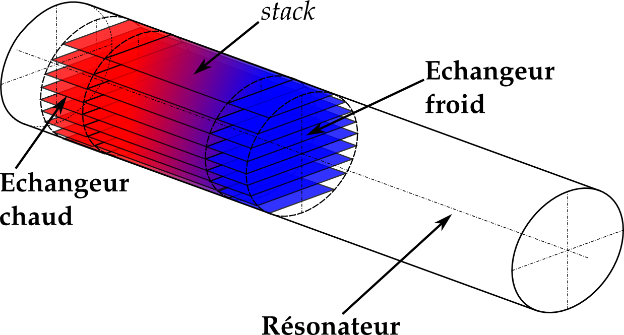 Représentation schématique d'une machine thermoacoustique